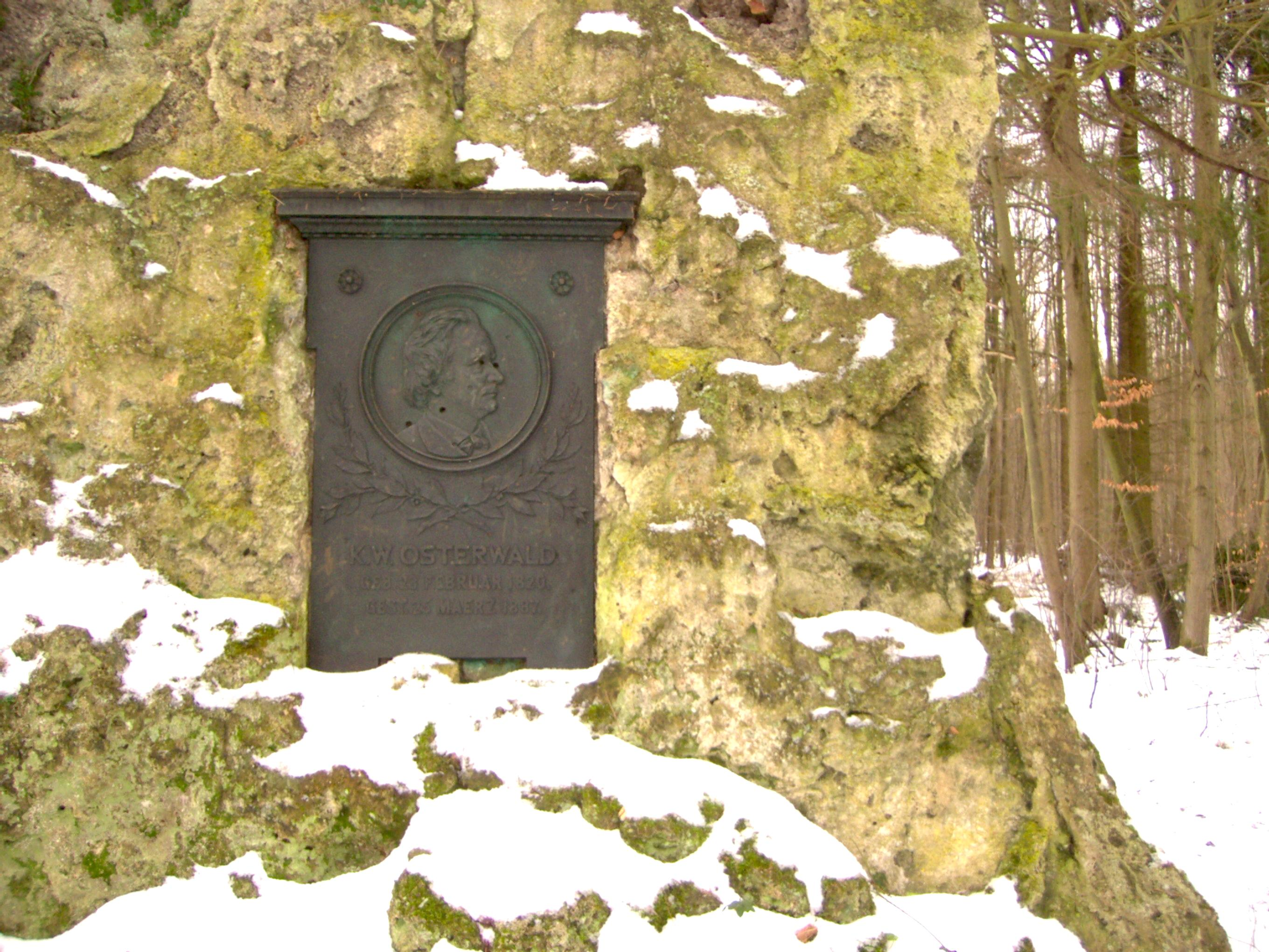 Ausschnitt aus dem Osterwald-Denkmal am Weißen Haus am Ostrand des Mühlhäuser Stadtwalds. Eigene Fotografie vom Januar 2007.